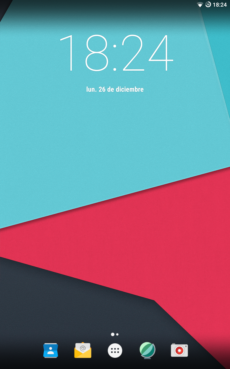 Captura de pantalla de CyanogenMod 14.1 a una tauleta Samsung Galaxy Tab 3 8"